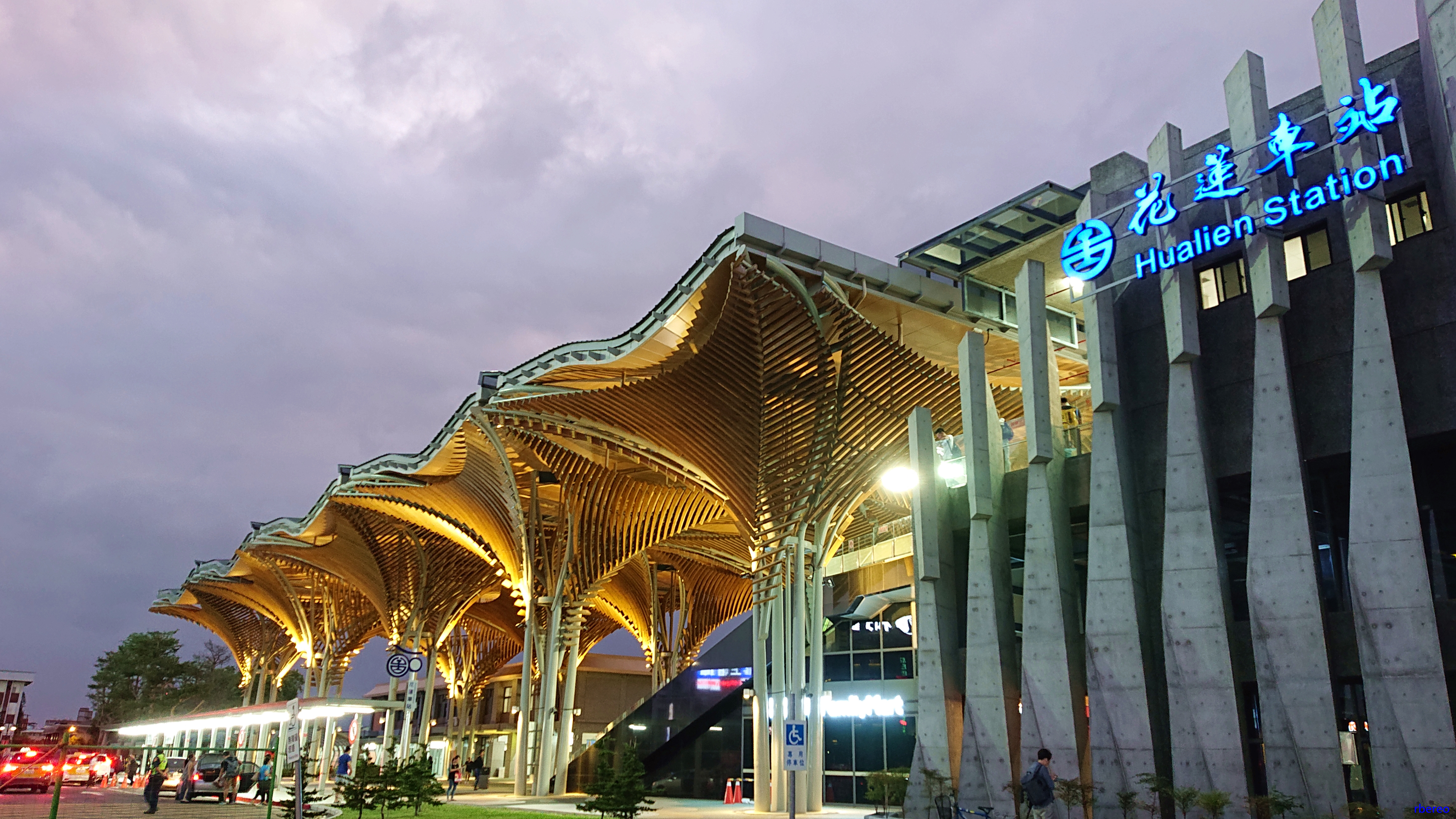 108年10月花蓮車站東站